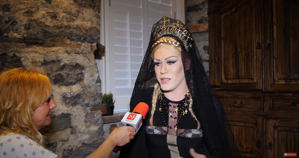 Le personnificateur de célébrités Jimmy Moore est en spectacle résidence au District Video Lounge les jeudis soirs | Video temps: 1:41 s.